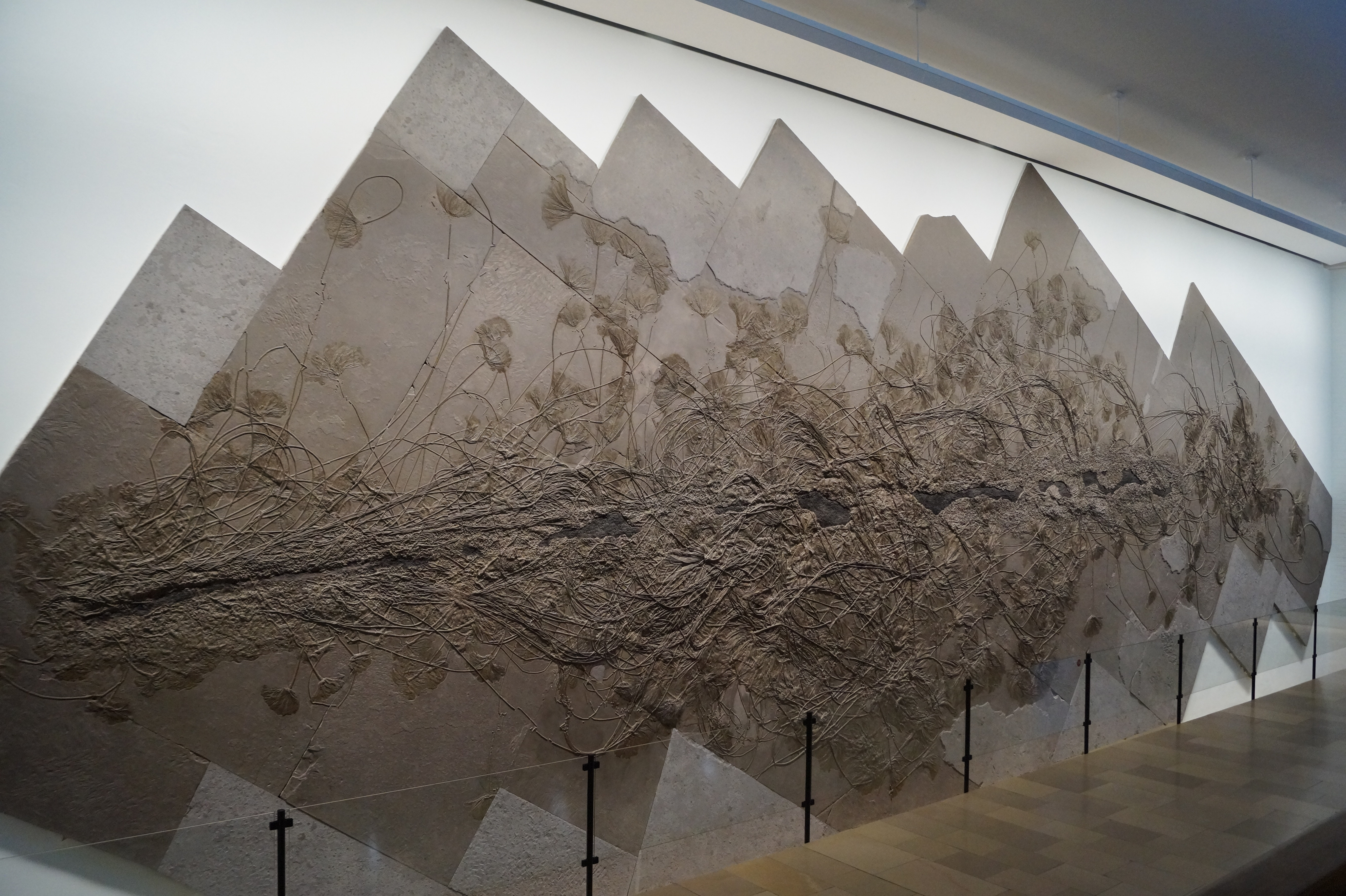 Ausstellungsstück(e) im Urwelt-Museum Hauff, das Fossilien aus der Formation des Posidonienschiefers der Schwäbischen Alb zeigt